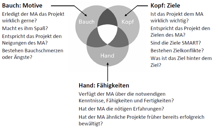 Deitsch: Praktische Anwendung des 3K-Modells: Situationsdiagnose. MA = Mitarbeiter